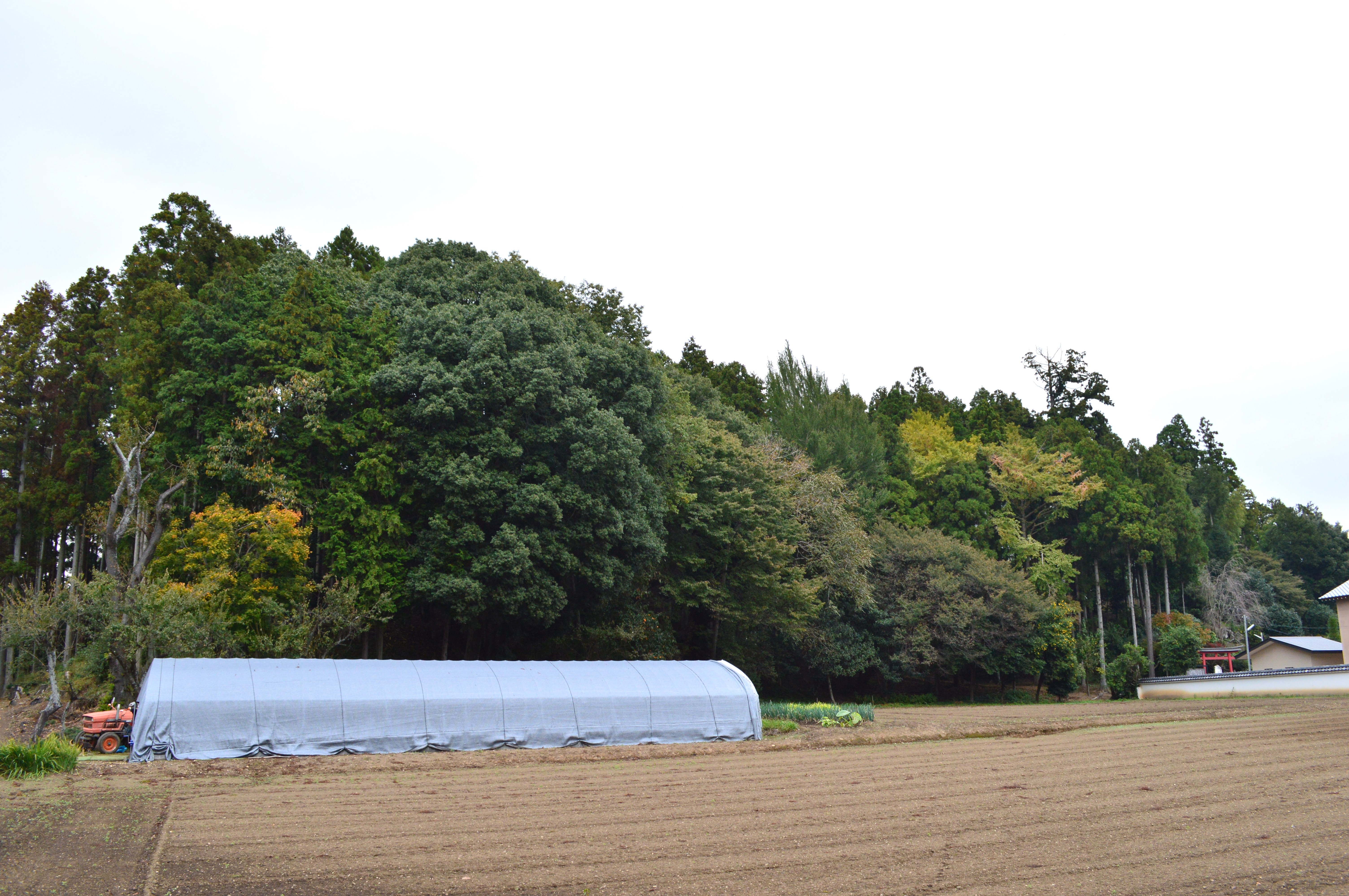 梵天山古墳 全景